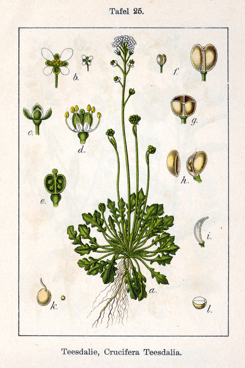 IPNI: Teesdalia nudicaulis (L.) R. Br. : Teesdalia nudicaulis (L.) R.Br., syn. Crucifera teesdalia E.H.L.Krause Unresolved name: Crucifera teesdalea E.H.L.Krause Original Description Teesdalie, Crucifera teesdalia